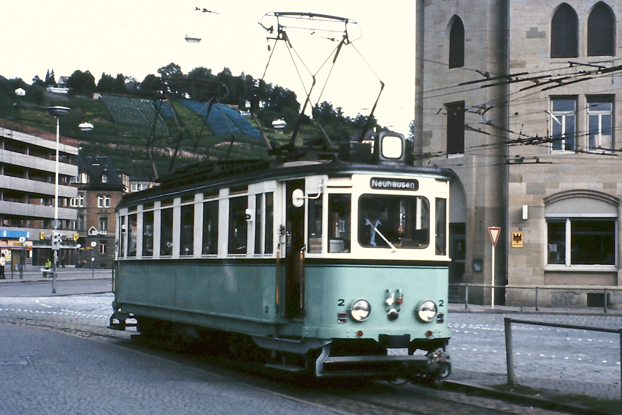 Triebwagen 2 der Straßenbahn Esslingen-Nellingen-Denkendorf in der Wendeschleife am Bahnhof Esslingen; rechts im Bild Fahrdrähte des Esslinger Obusses